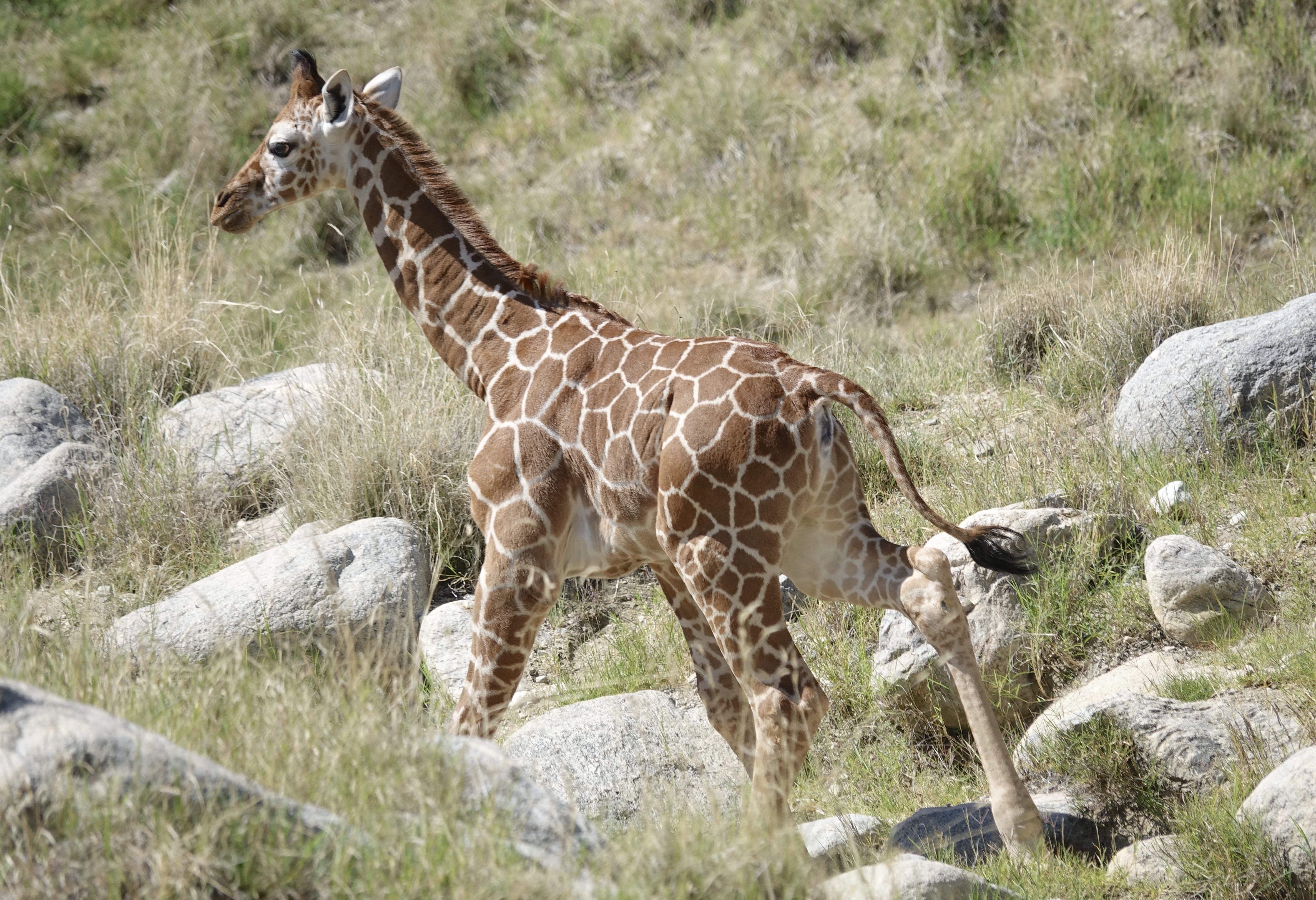 Giraffe at Living Desert Zoo